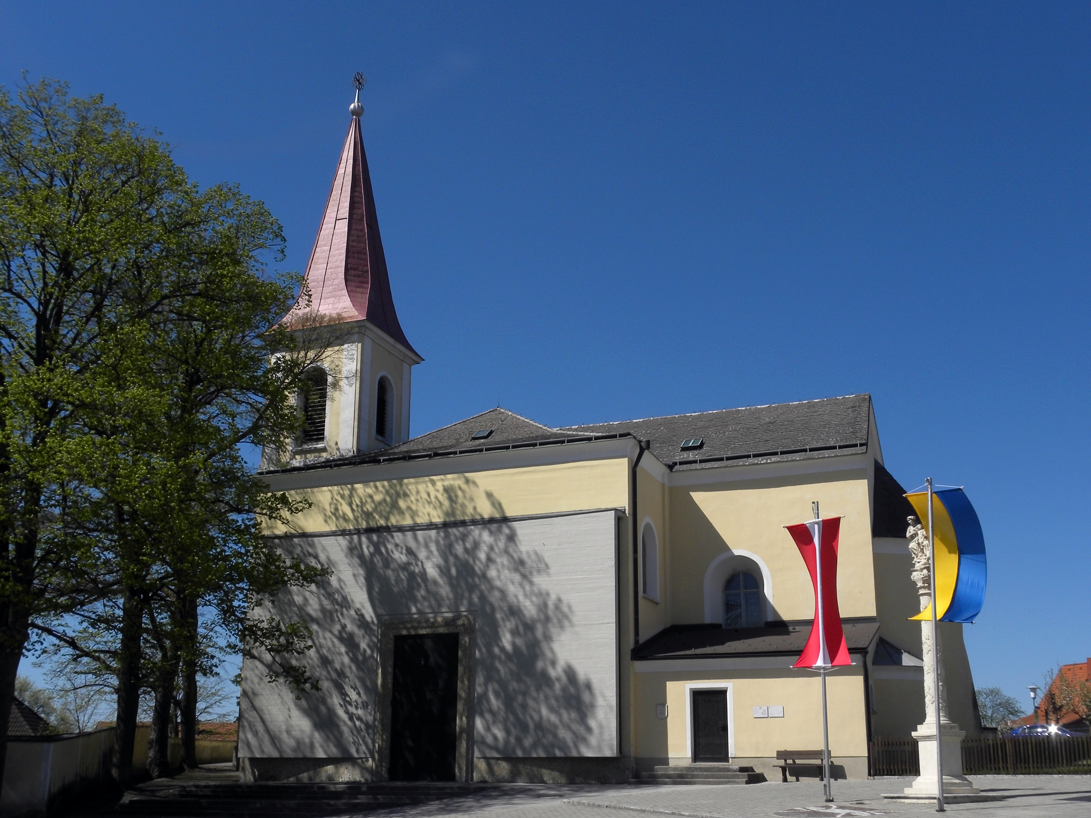 Die aus verschiedenen Epochen der Baukunst stammende katholische Pfarrkirche ist dem Heiligen Laurentius geweiht.